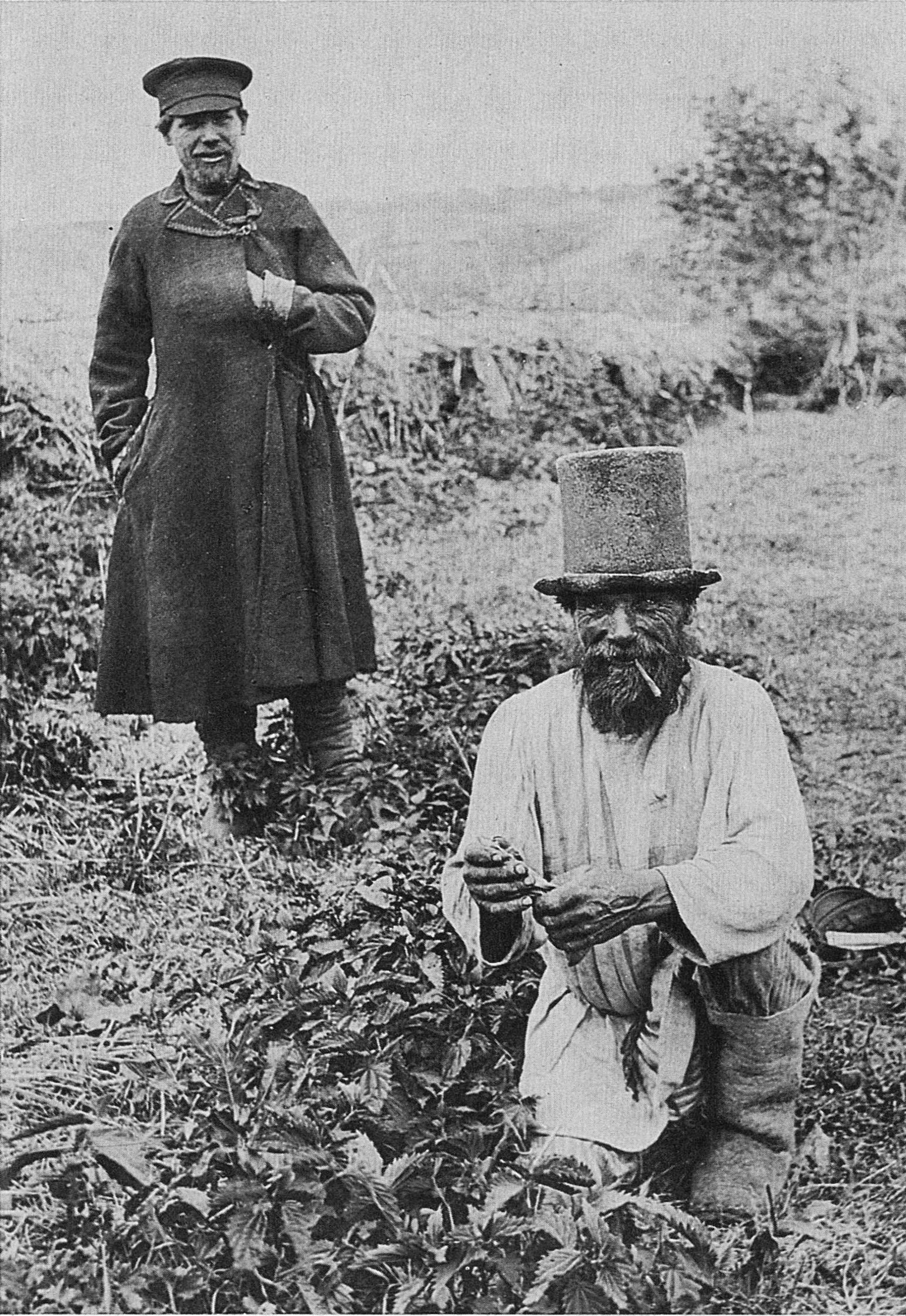 Крестьяне в повседневной одежде. Воронежская губерния, 1908. РЭМ. Кол. 3159-12